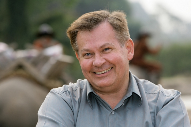 photo de Frédéric Lepage